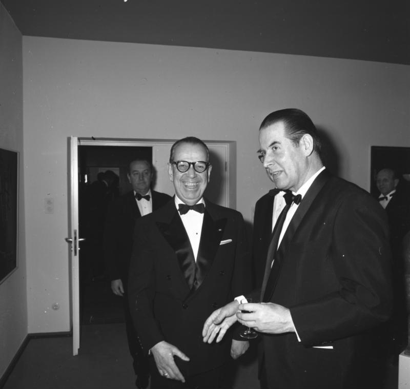 BM Schröder empfängt den türk. Außenmin. Feridun Cemal Erkin, Venusberg